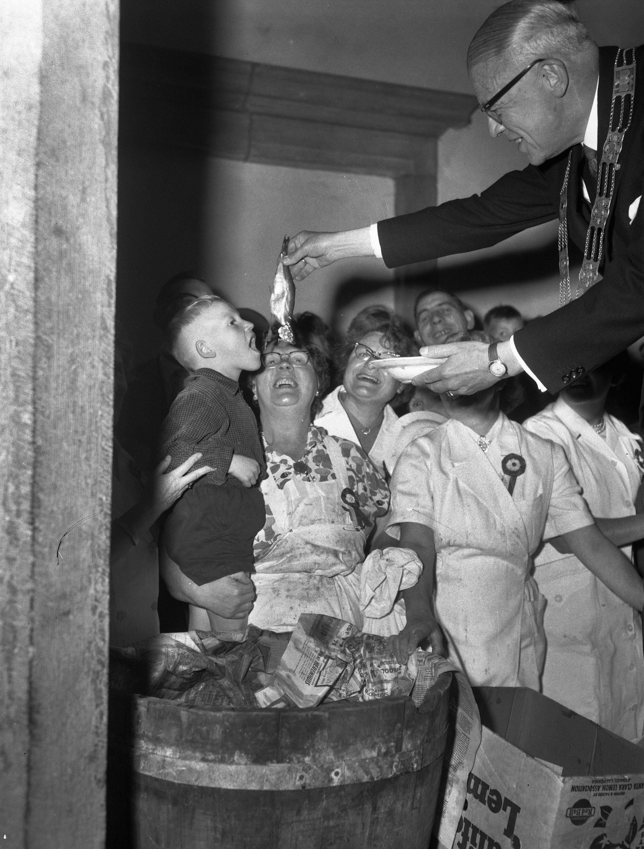 Collectie / Archief : Fotocollectie Anefo Reportage / Serie : [ onbekend ] Beschrijving : 3 oktober feesten in Leiden Datum : 3 oktober 1960 Locatie : Leiden, Zuid-Holland Trefwoorden : FEESTEN Fotograaf : Behrens, Herbert / Anefo Auteursrechthebbende : Nationaal Archief Materiaalsoort : Negatief (zwart/wit) Nummer archiefinventaris : bekijk toegang 2.24.01.04 Bestanddeelnummer : 911-6430